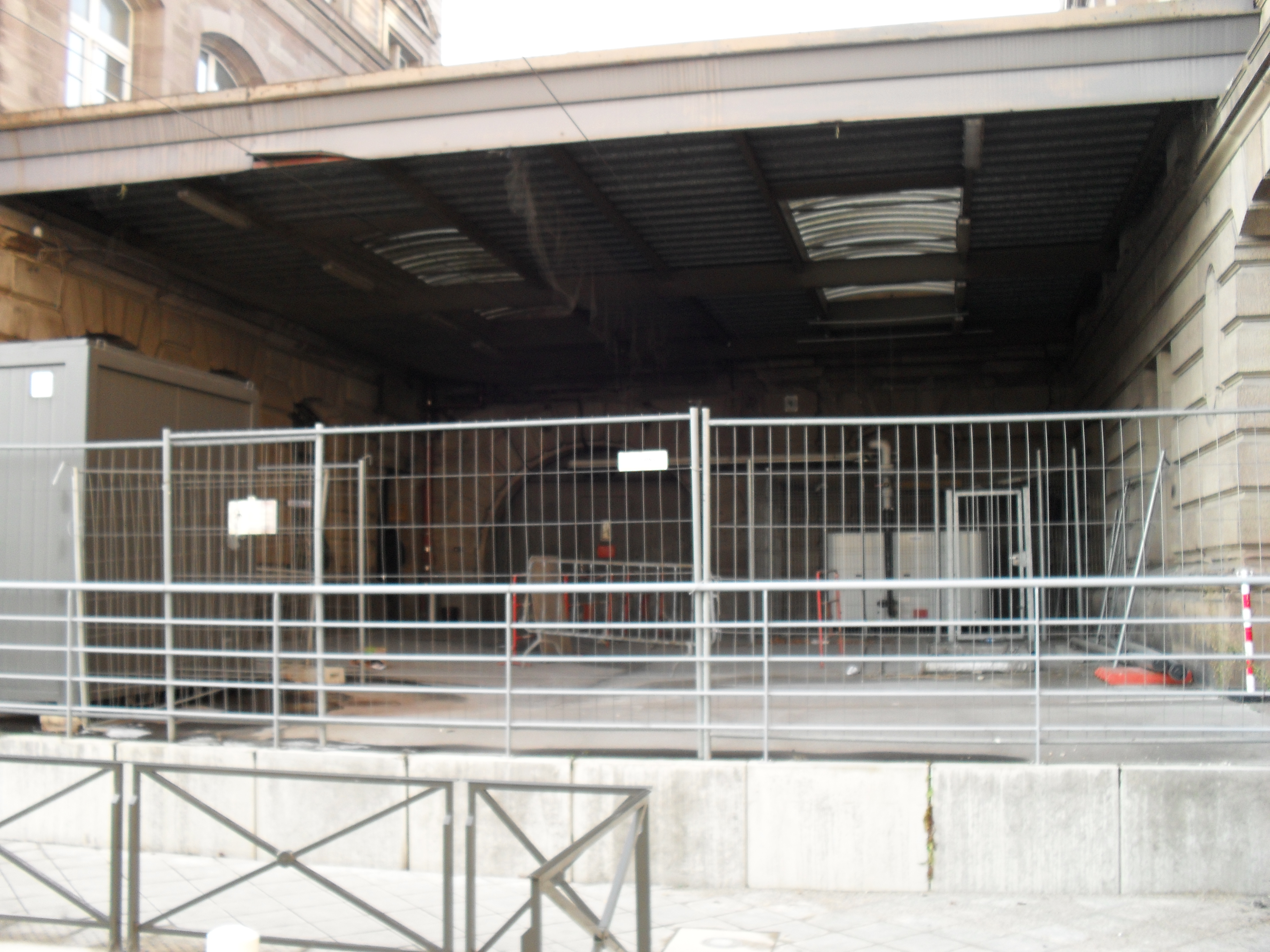 Futur débouché du tunnel passant sous les voies de la gare de Strasbourg